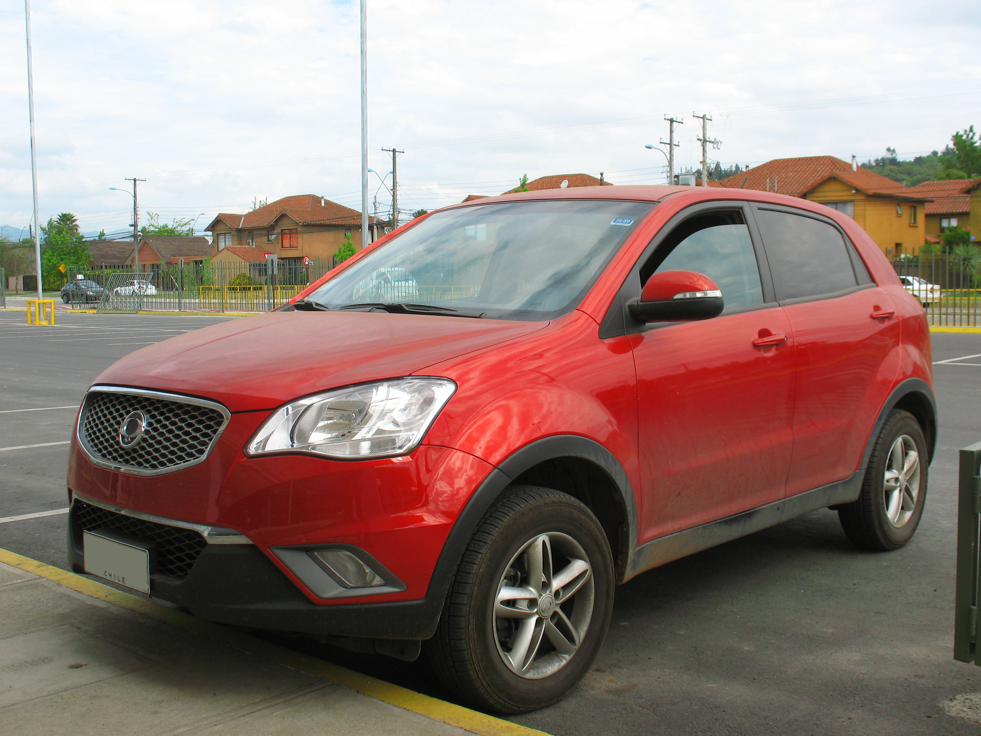 Ssangyong Korando G20D 2013